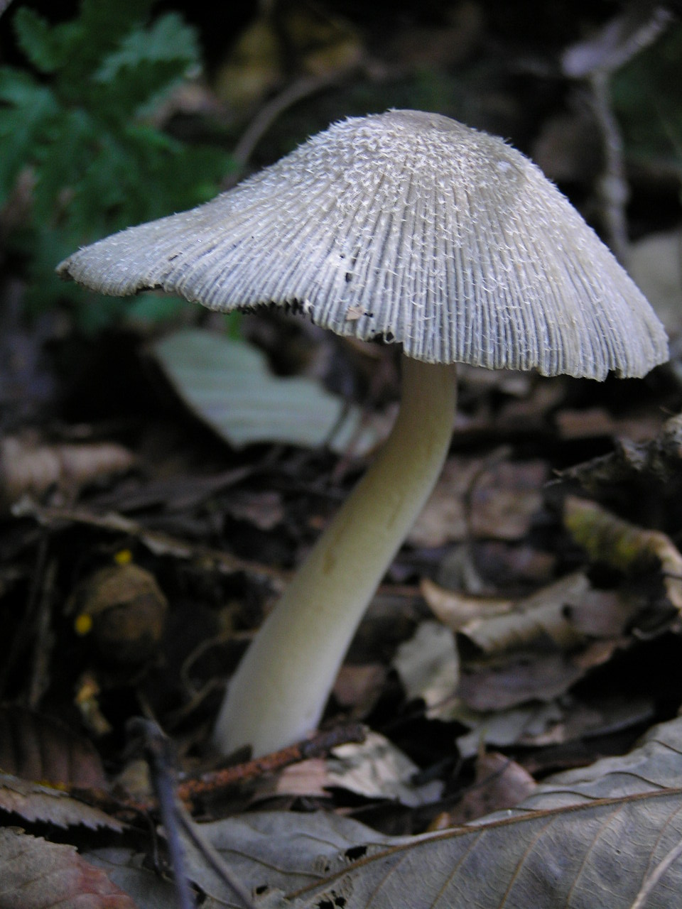 ヒトヨタケ ～photo by Autumn Snake 【おぉたむ すねィく探検隊】写真・きのこ部門 担当 勅使河原 賢明